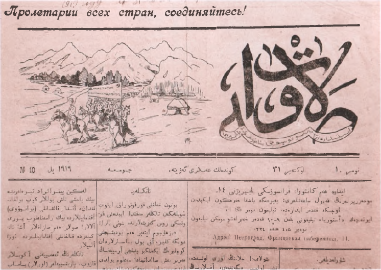 Башҡортса: Башҡорт кавалерияһы дивизияһының сәйәси бүлеге тарафынан сығарылған "Салауат" гәзите.